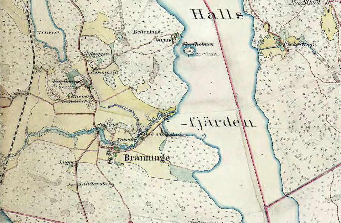 Del av Häradsekonomiska kartan visande Bränninge gård